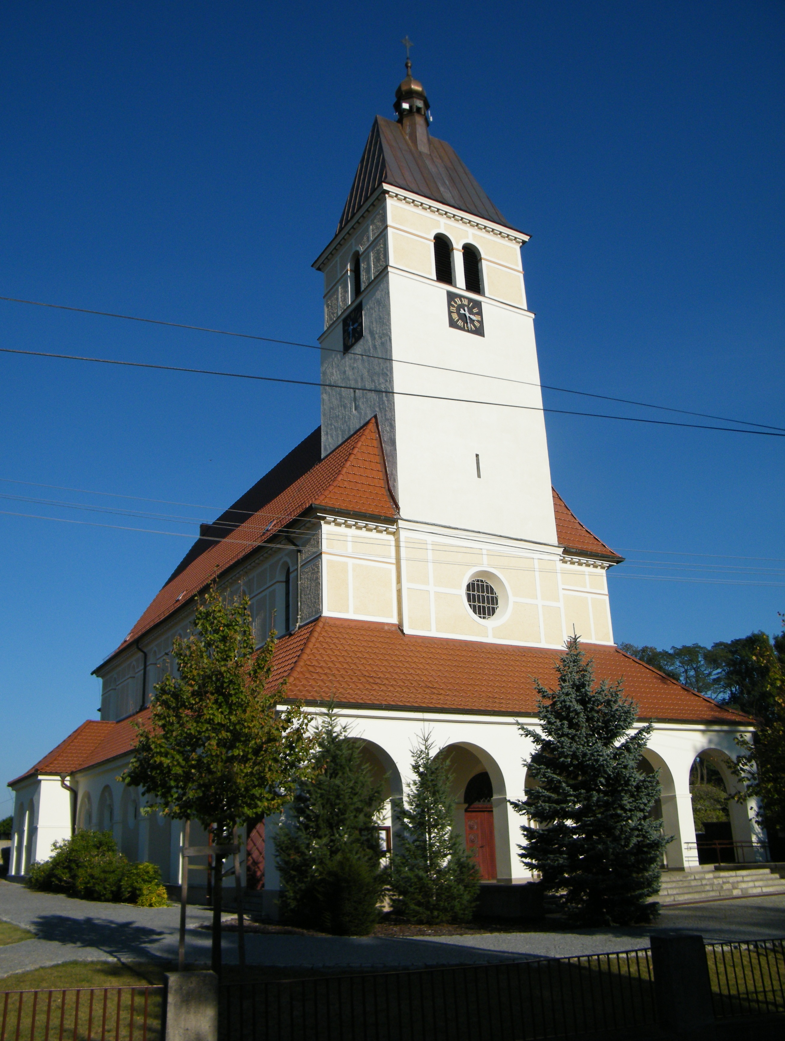 zespół kościoła par. p.w. Najśw. Serca Pana Jezusa Kościół par. p.w. Najśw. Serca Pana Jezusa, mur., 1920-1921 Cmentarz Kaplica poległych w I wojnie światowej, mur., po 1920 Grobowiec, mur., po 1920 Ogrodzenie z bramami, mur., 1930 Zagwiździe, Murów